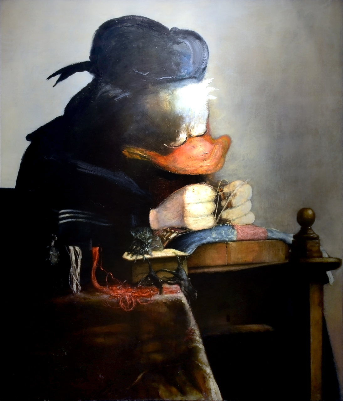 Bedřich Dlouhý, Krajkář (1987), olej na plátně